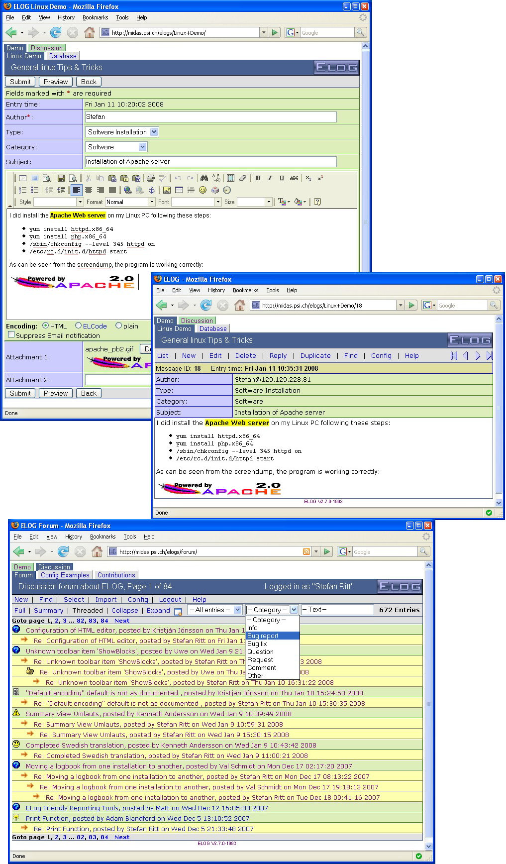 ELog Bildschirmansicht